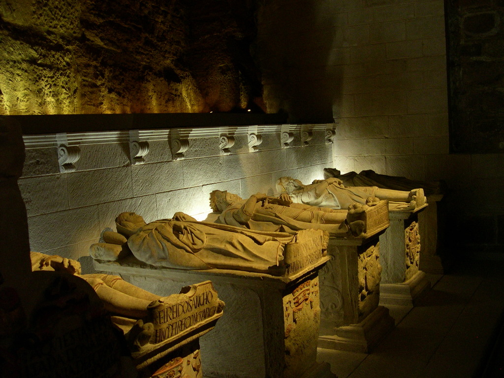 En la iglesia del Monasterio de Santa Maria la Real (Nájera) yacen una treintena de reyes de Navarra, León y Castilla.